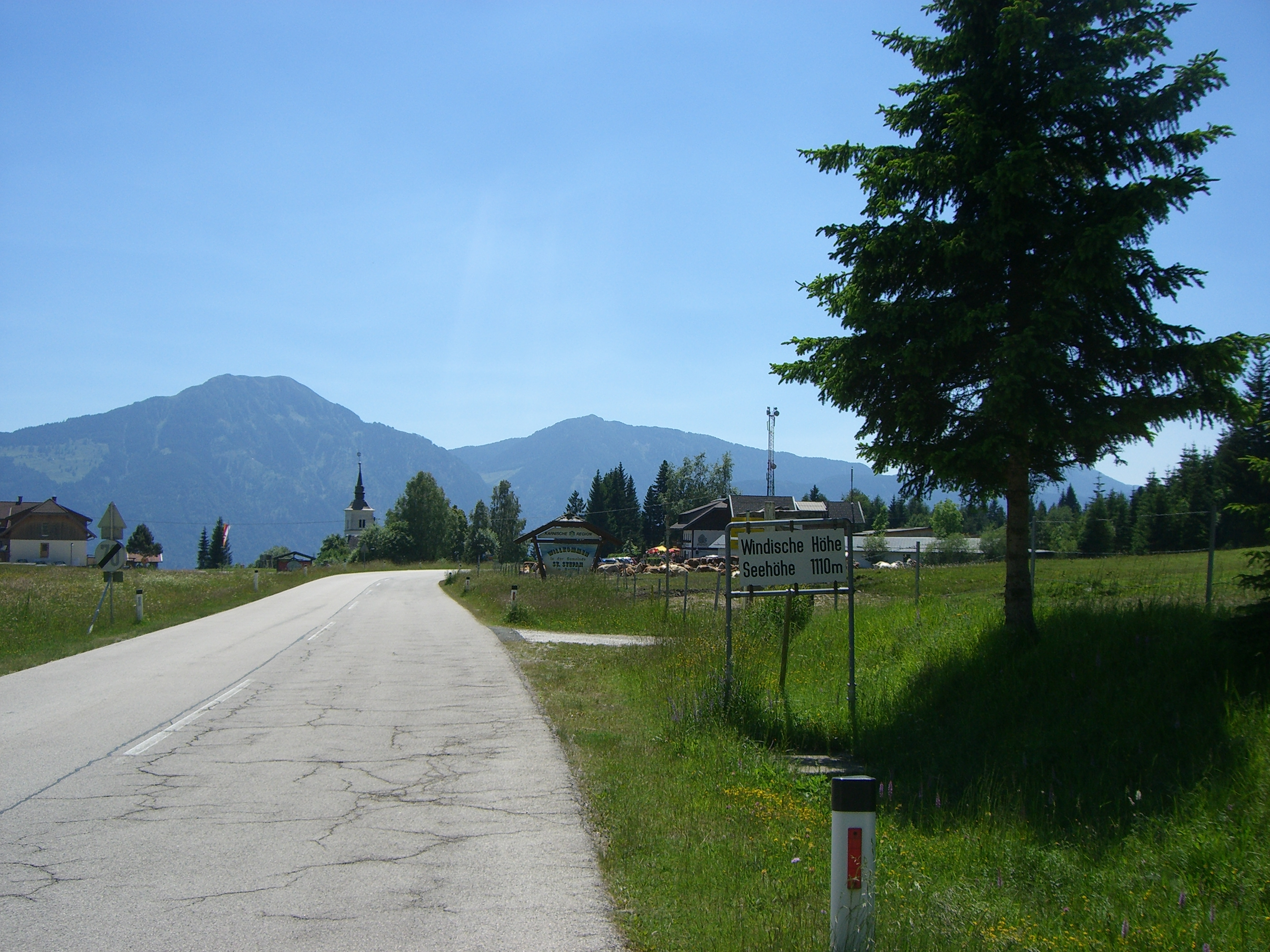 Windische Höhe - Passhöhe